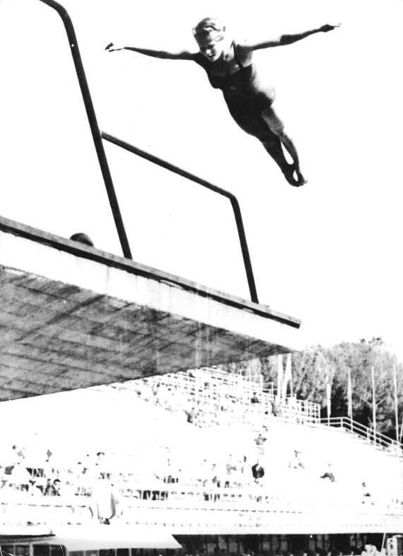 Zentralbild-AP Sd-Fr 30.8.1960 XVII. Olympische Sommerspiele 1960 in Rom (Kunstspringen Damen) Die 17jährige DDR-Springerin Ingrid Krämer beim Kusntspringen der Damen am 27.8.1960. Sie holte die Goldmedaille vor Pope (USA) und Ferris(Großbritannien).